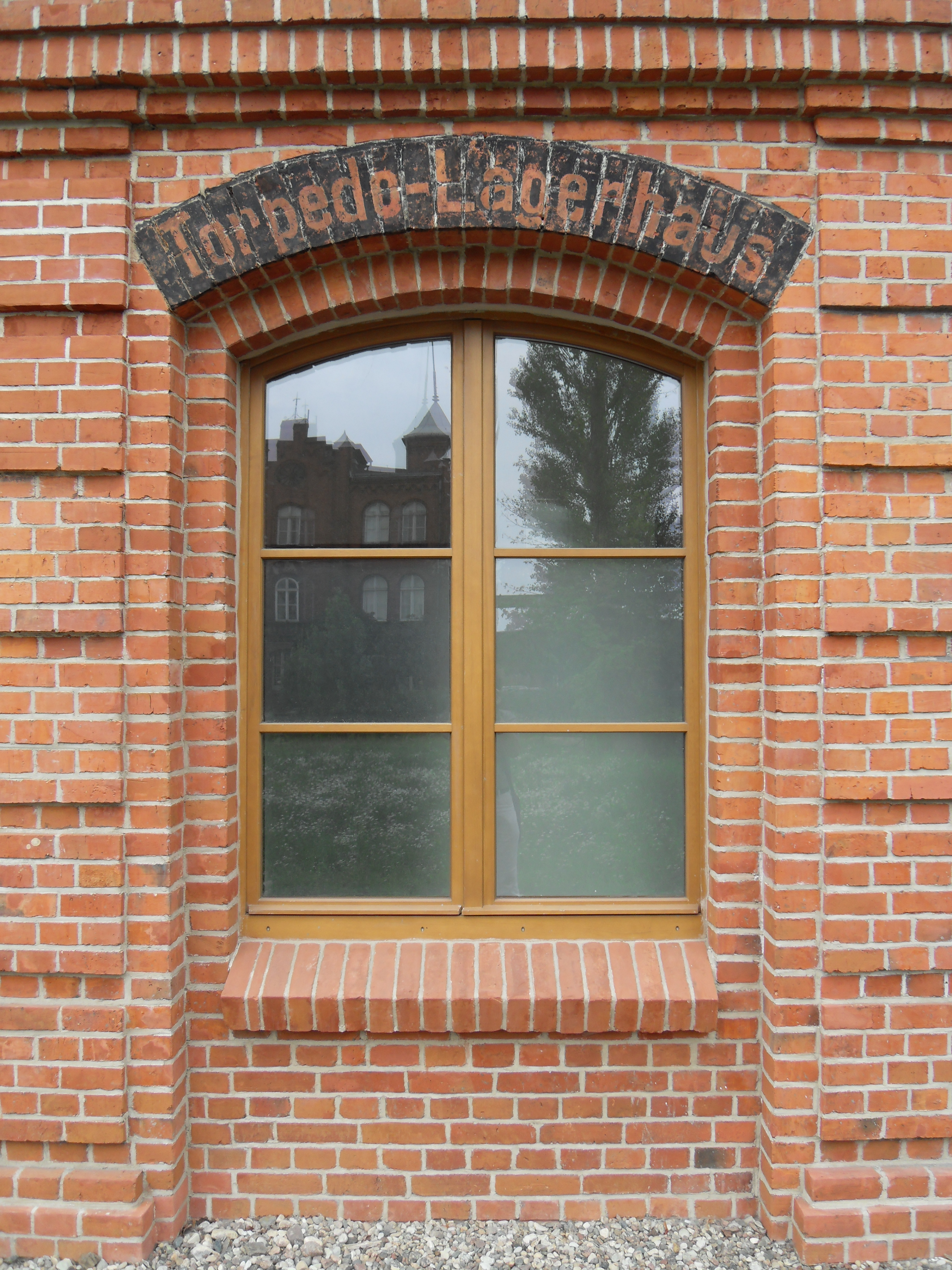 Stocznia Gdańska, sala BHP (dawny magazyn torped).